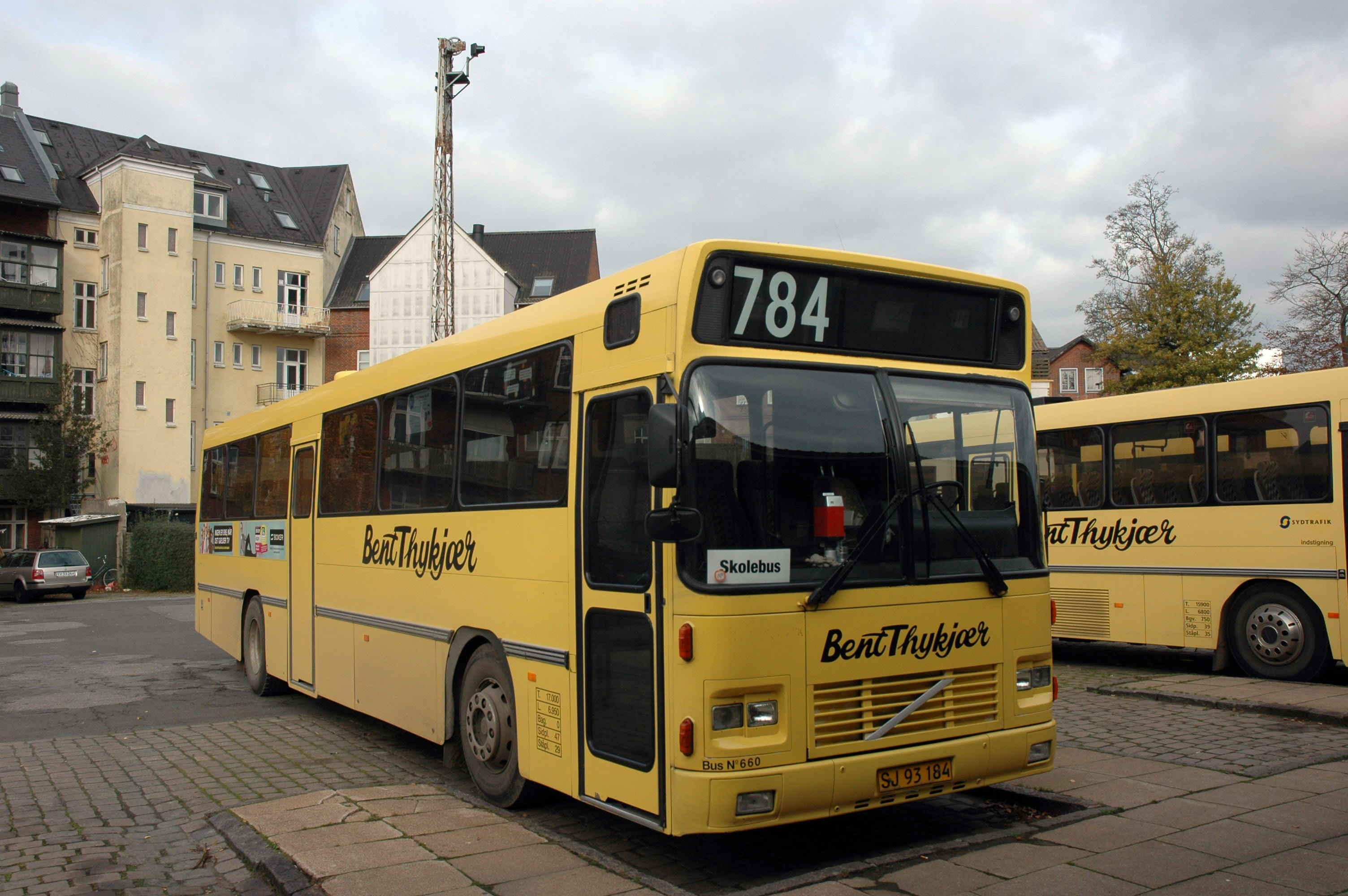 Bent Thykjær bus no. 660 på Kolding Rutebilstation.